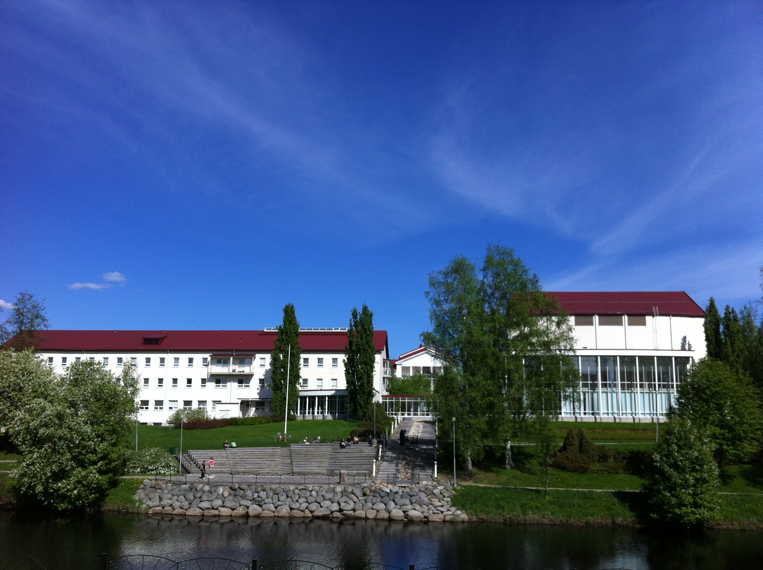 Kampuskirjasto sijaitsee Kampustalossa / Campus Library is situated in Campus House